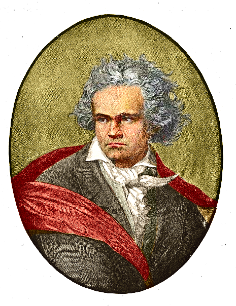 Ludwig van Beethoven PD tekening van UT Library, ingekleurd naar bestaande schilderijen